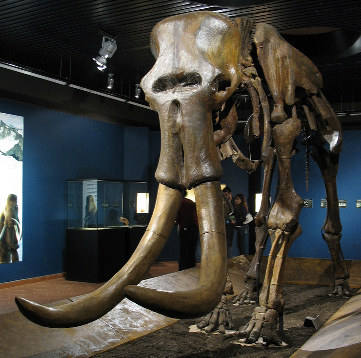 Il tesoro paleontologico della Russia